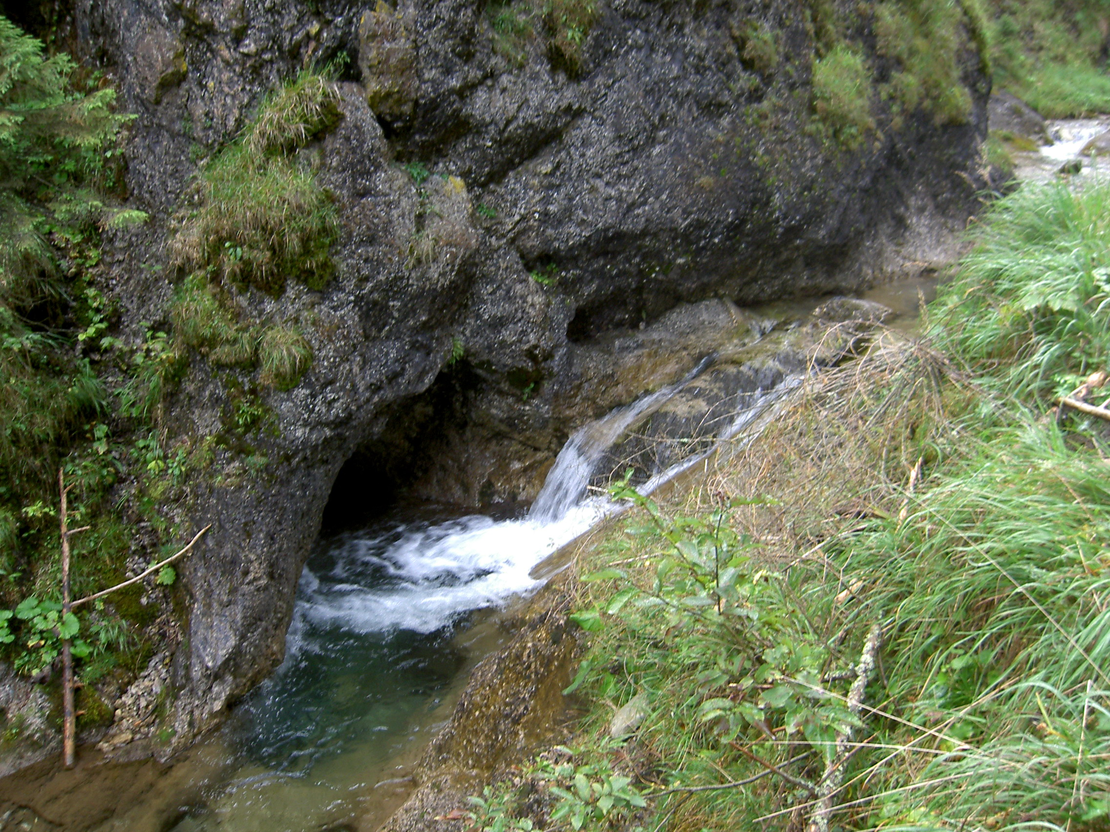 Juráňová dolina